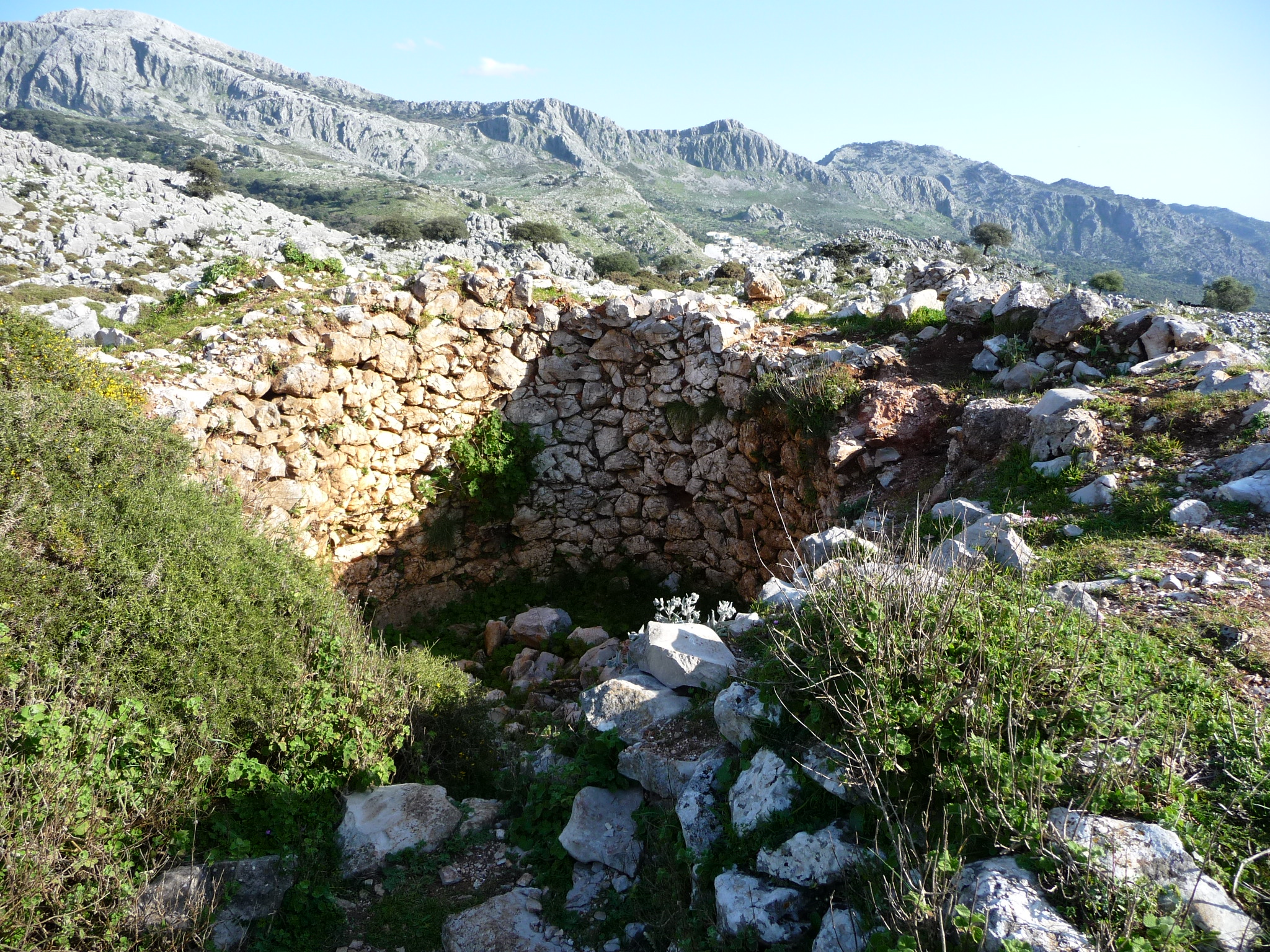 Calera en el camino de casa Dornajo a Benaocaz por el Salto del Cabrero - Parque Natural Sierra de Grazalema (Andalucía, España)